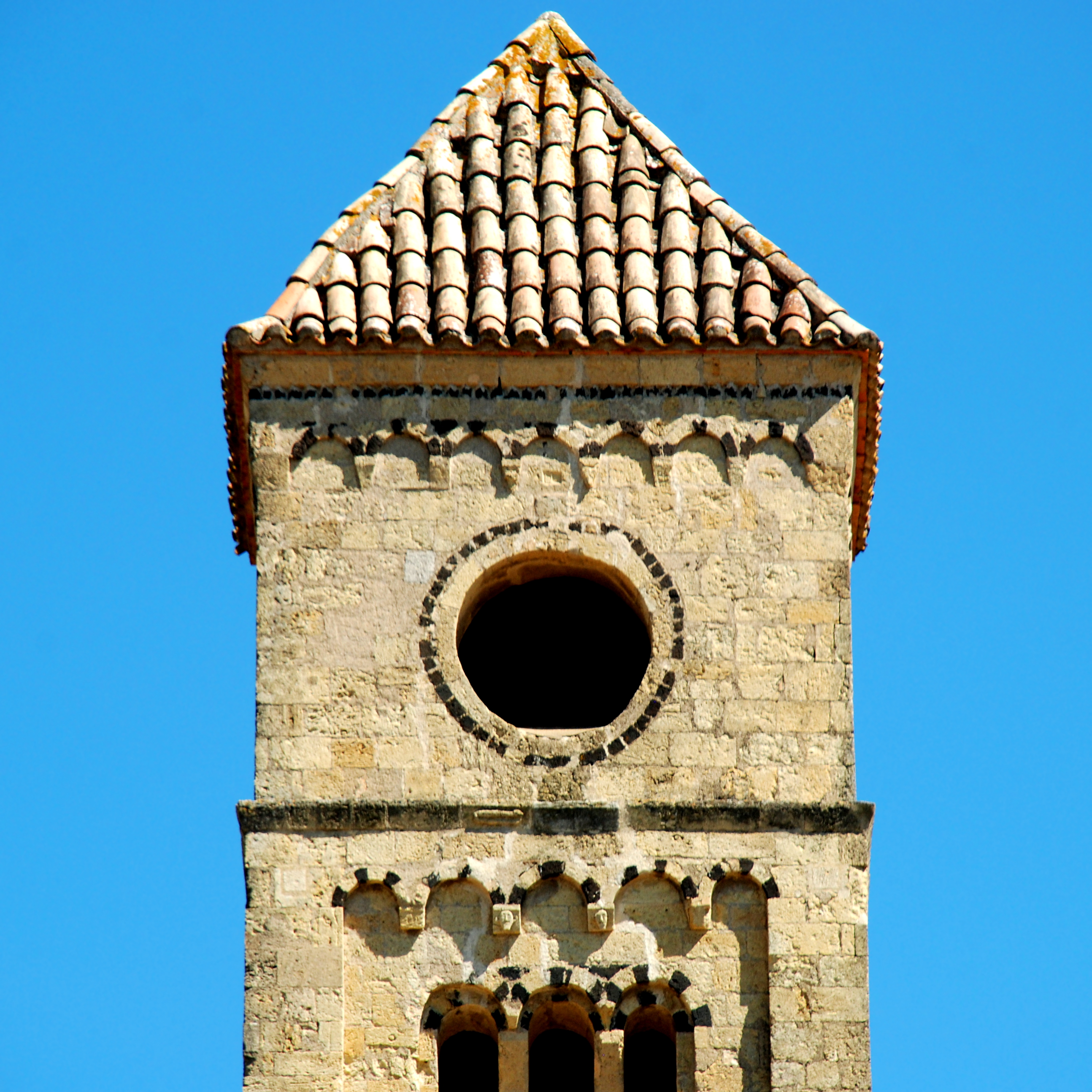 France - Languedoc - Hérault - Puissalicon - ancienne église Saint-Étienne de Pezan - tour romane .